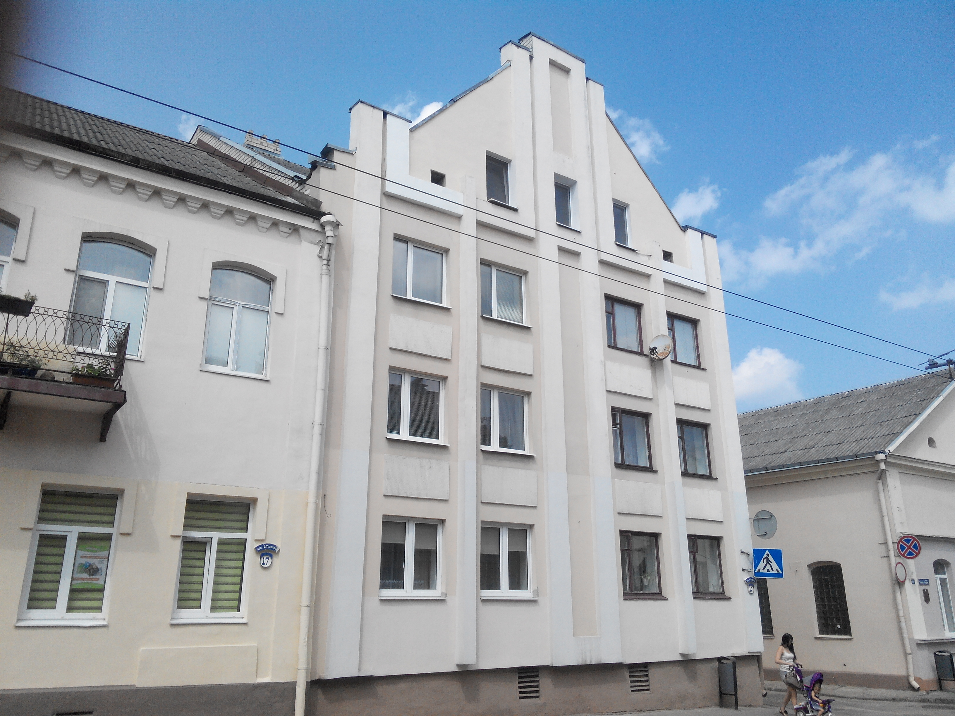 Будынак па вуліцы Вялікая Траецкая, 15, Гродна, Беларусь